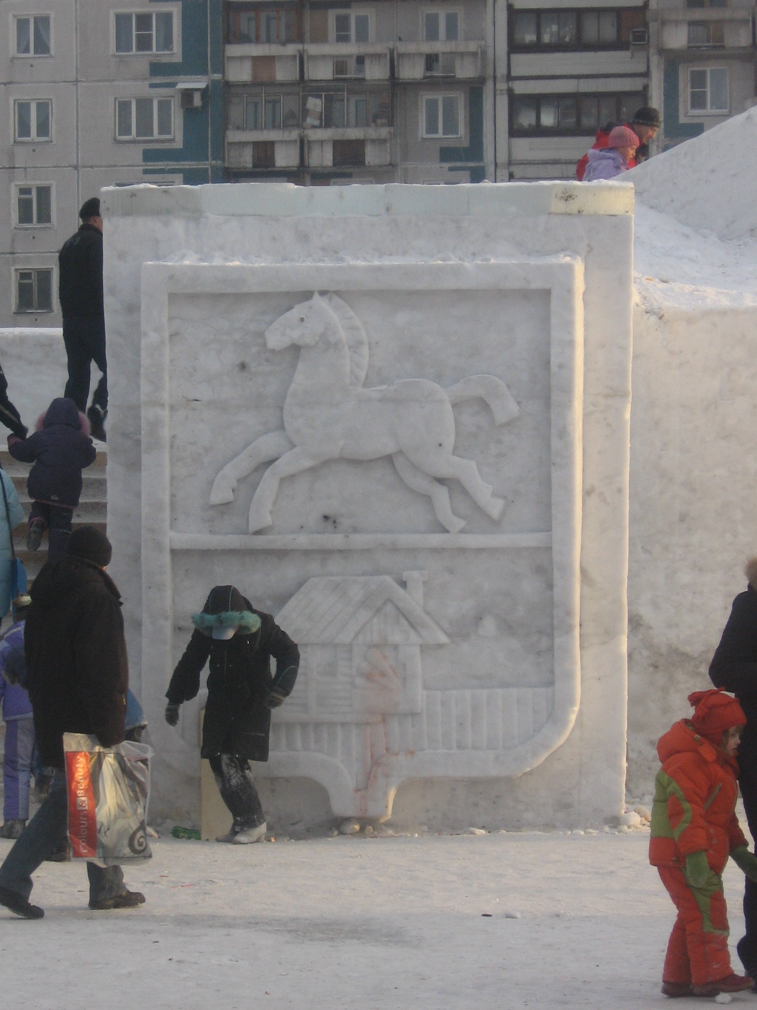 La Stemma di Novokuzneck di Ghiaccio, Piazza degli Eventi Popolari, Novokuzneck(Russia).